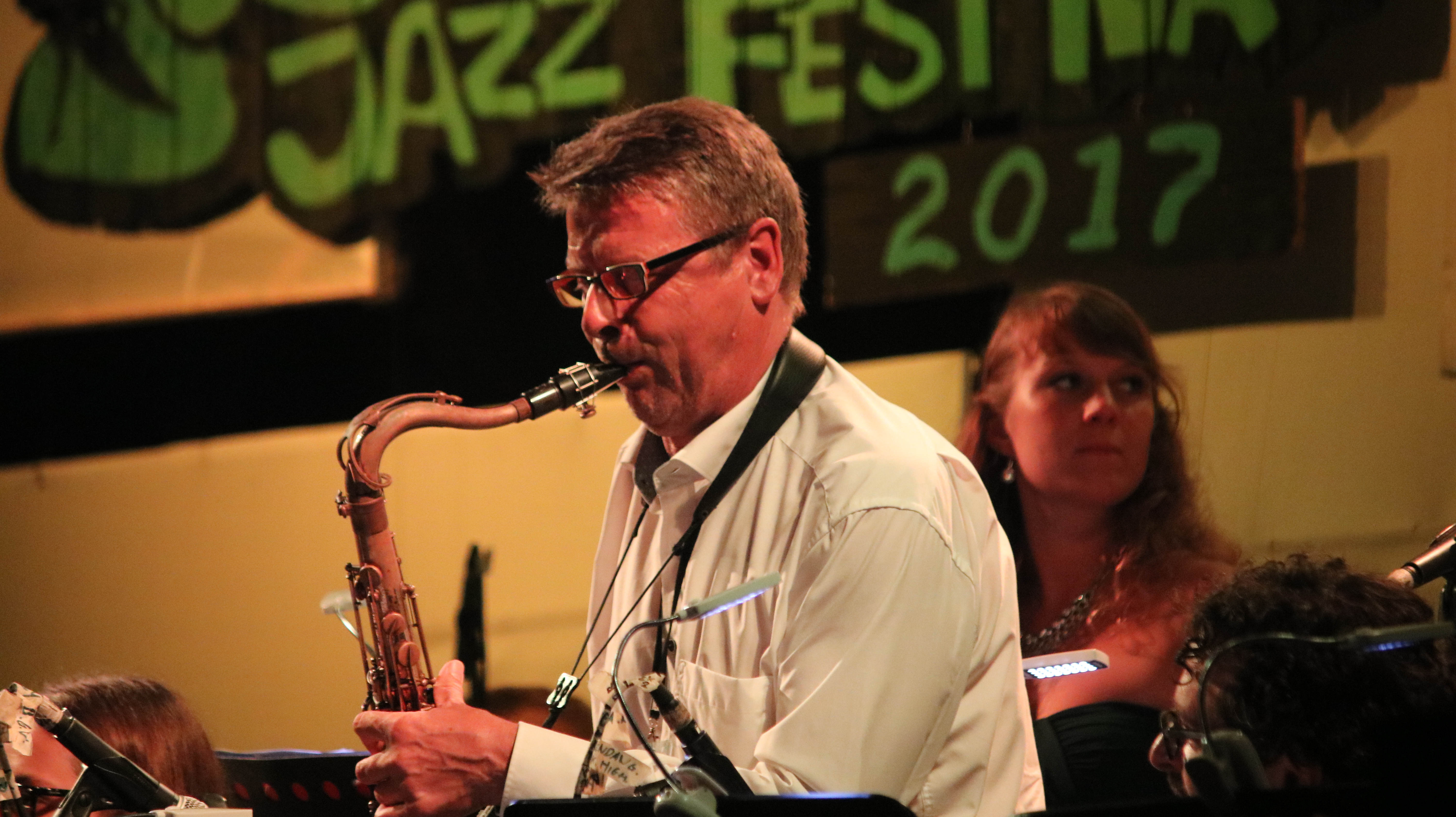 Foto vom Ubud Jazz Festival, Bali 2017